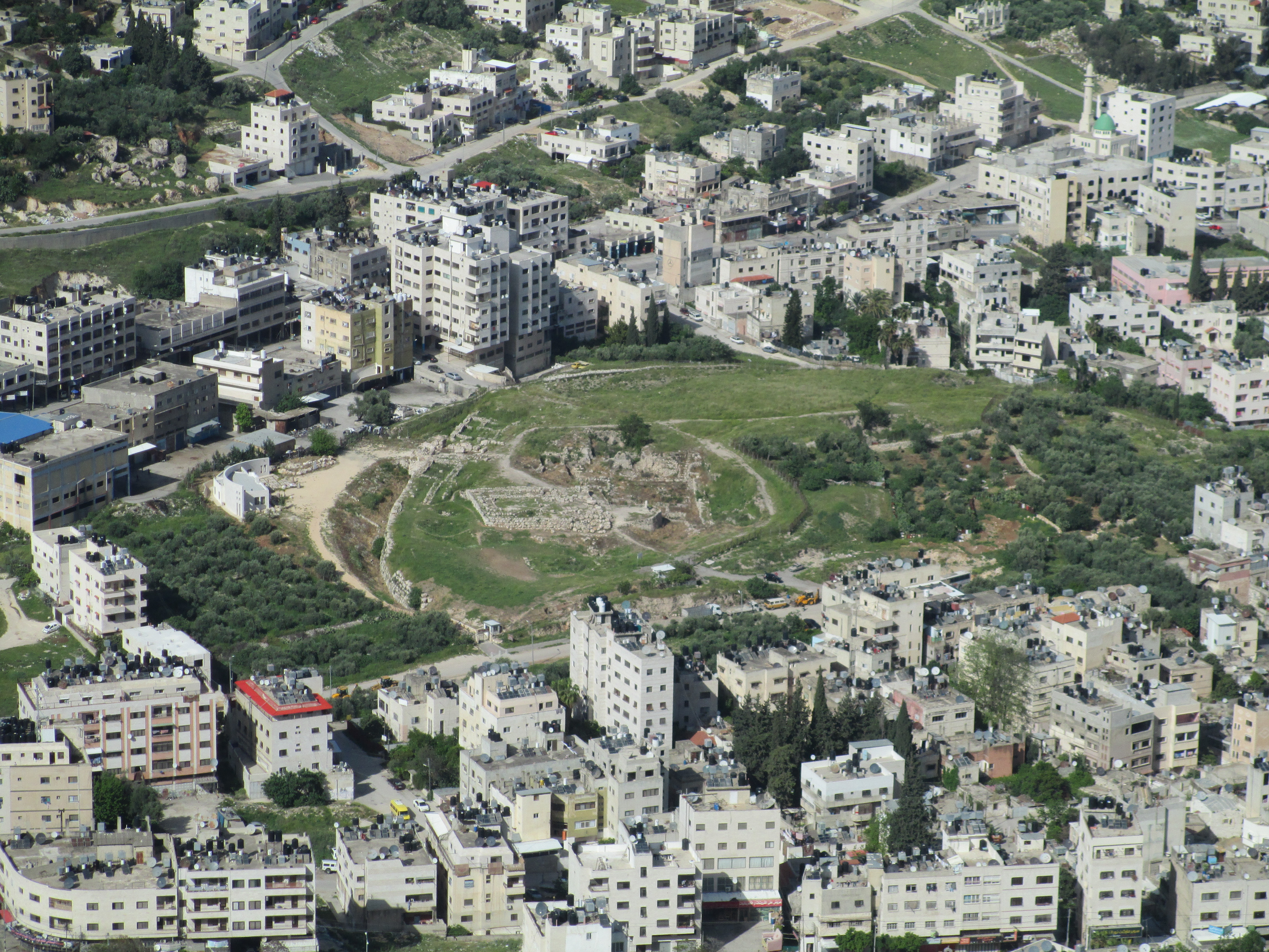 תל שכם (בלאטה), מבט ממצפה יוסף על הר גריזים